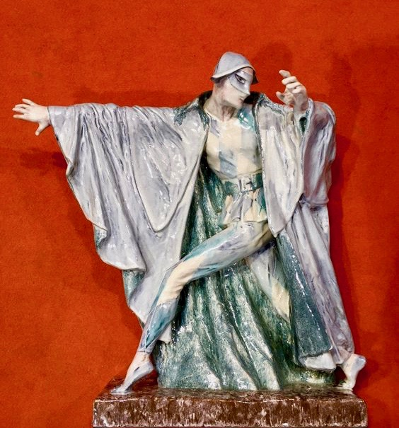 MAURICE GUIRAUD RIVIERE (1881-1947) Importante sculpture en céramique émaillée craquelée blanc gris et vert figurant un personnage de la Commedia dell'arte reposant sur une base rectangulaire brune. Signée «M.Guiraud Rivière», marque de la manufacture d'André Fau à Boulogne et cachet «Made in France». Vers 1930. H : 68 cm L : 58 cm P : 28 cm.